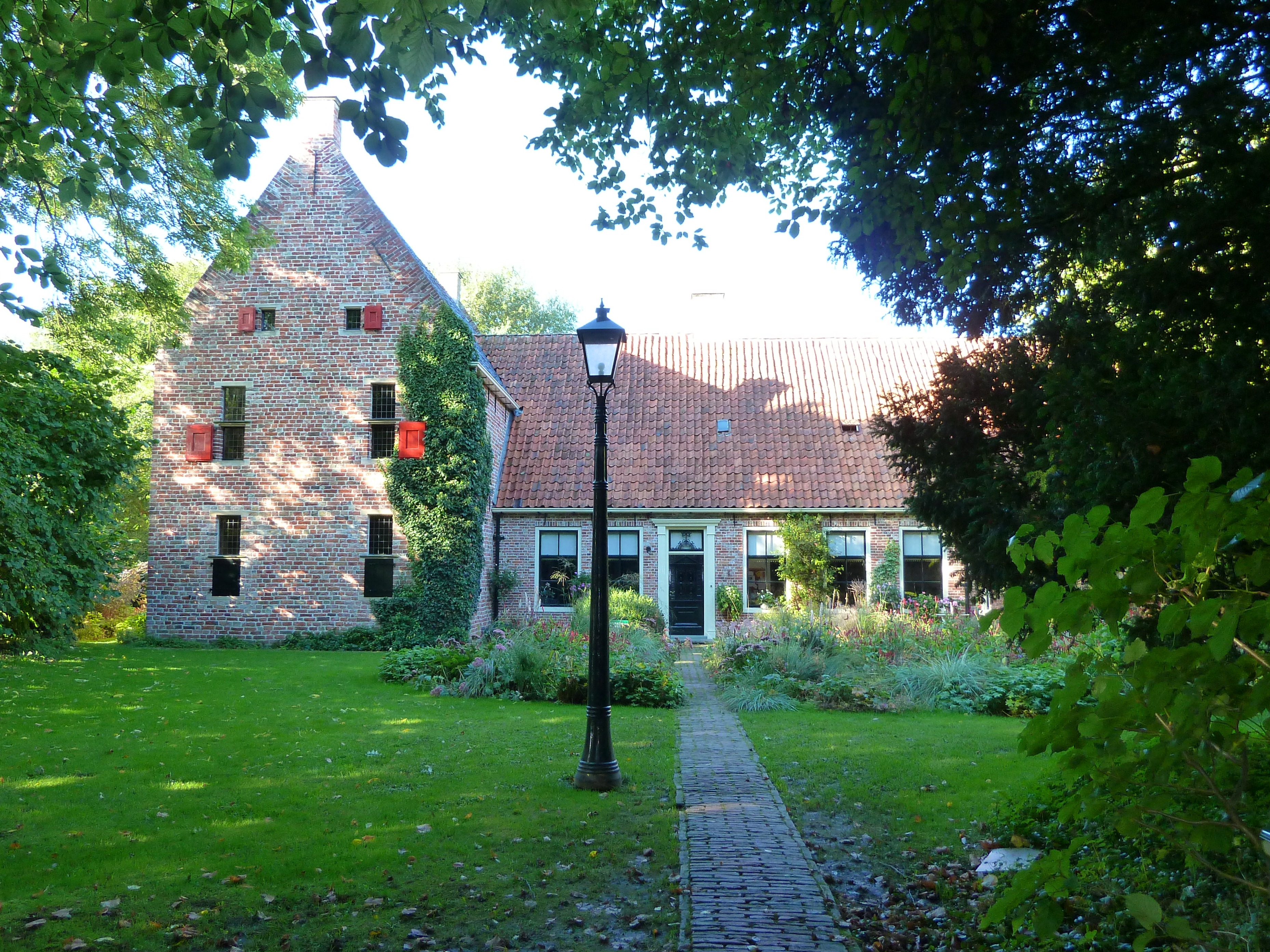 Herbouwde weem van Henk Helmantel in Westeremden. Van 1260 tot 1913 stond er een weem. Van 1914 tot 1972 stond er een pastorie. Sinds 1974 is Helmantel doende geweest met de herbouw van de weem in oude stijl. In 2004 werden de 16e eeuwse vensters geplaatst.